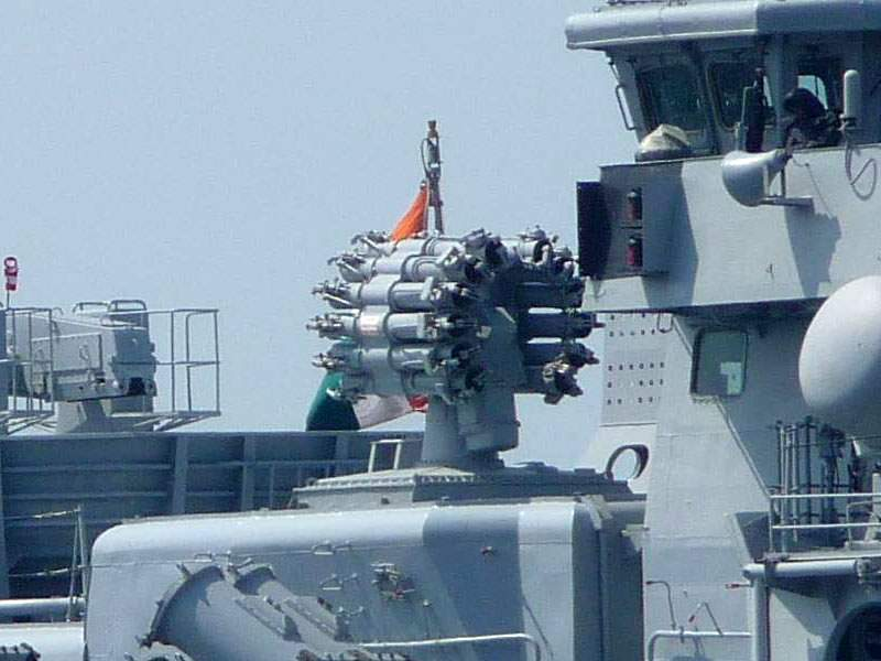 Реактивный бомбомёт РБУ-6000 на эсминце D61 «Дели» ВМФ Индии. Снято во время визита индийских кораблей во Владивосток 19.04.2011 г.